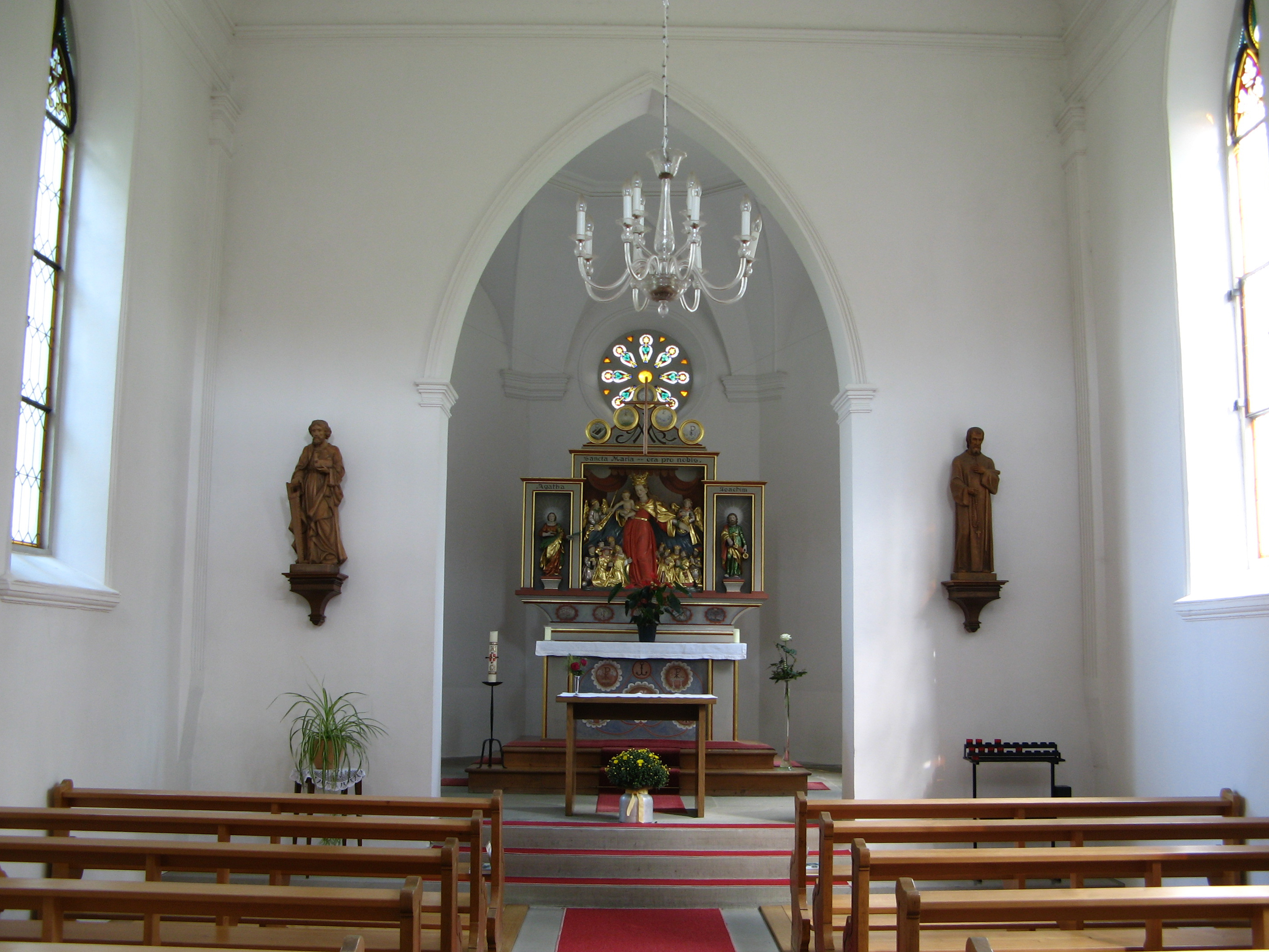 Mariahilfkapelle in Unterrüti bei Merenschwand, Innenansicht